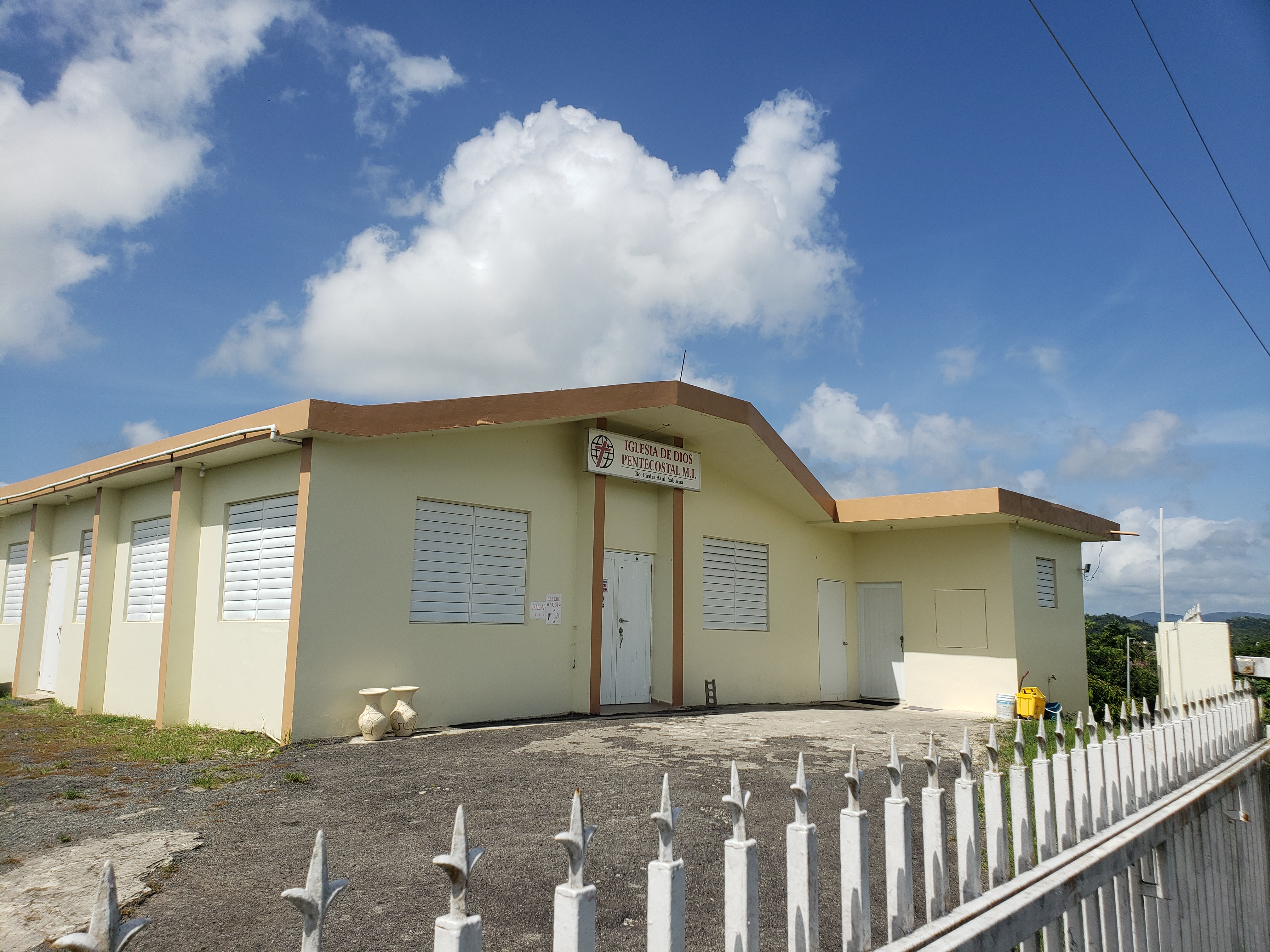 Iglesia de Dios Pentecostal en Sector Piedra Azul in Tejas, Yabucoa, Puerto Rico